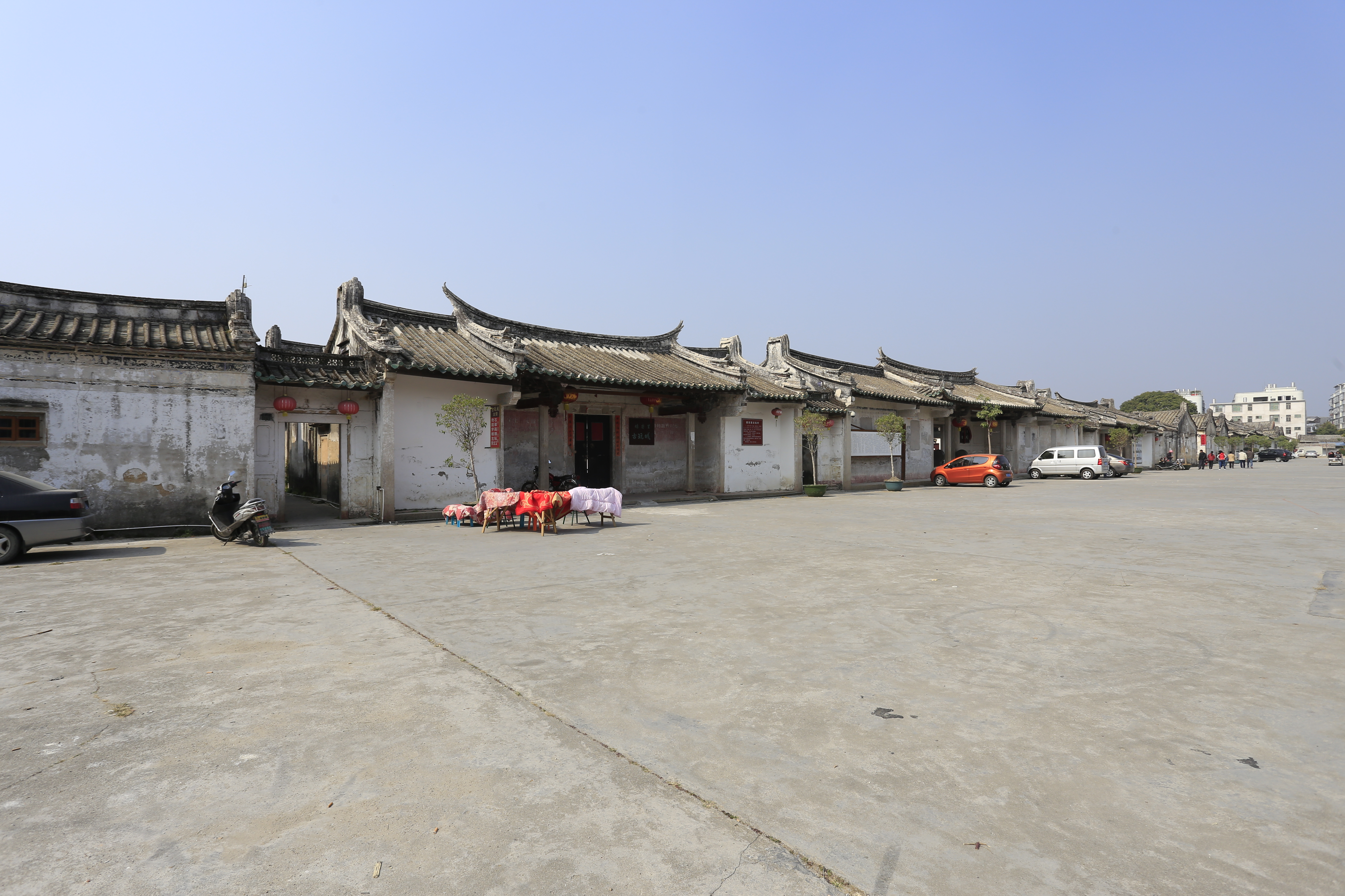 德安里